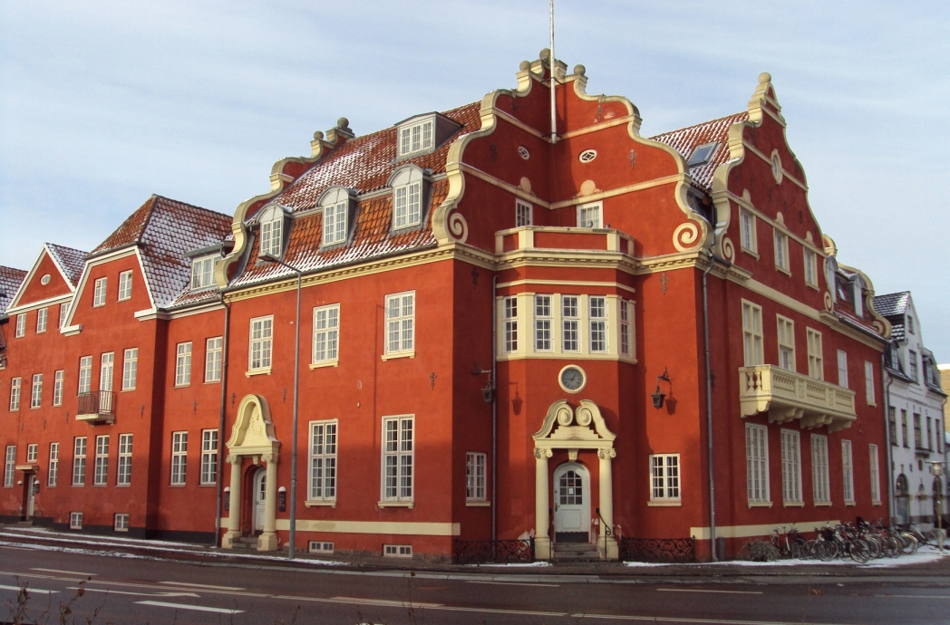 Altes Rathaus in Hørsholm